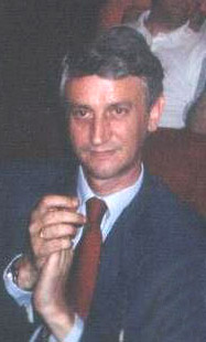 Piero Badaloni